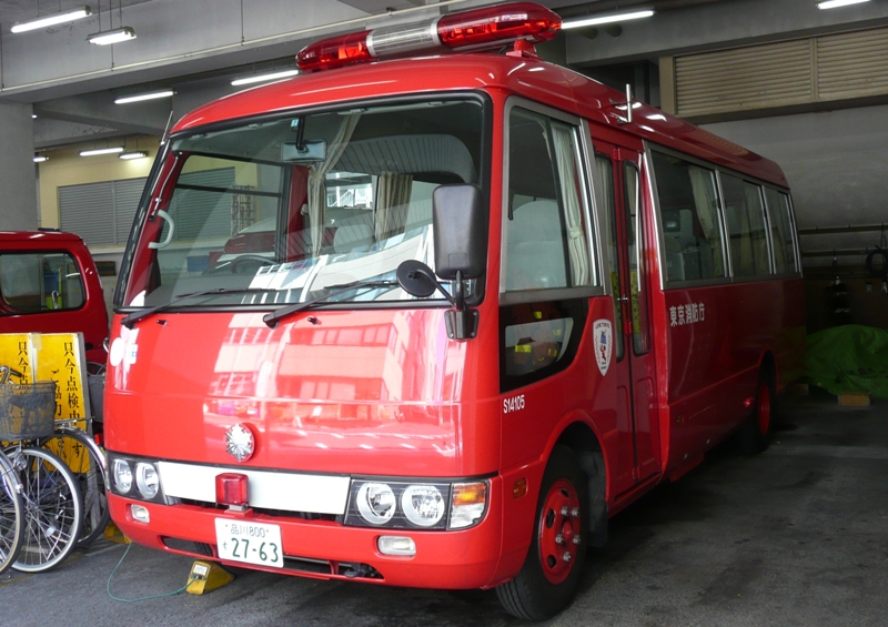 Mitsubishi Fuso Rosa. 京橋消防署の庁舎開放イベント消防わくわくパークにて撮影。